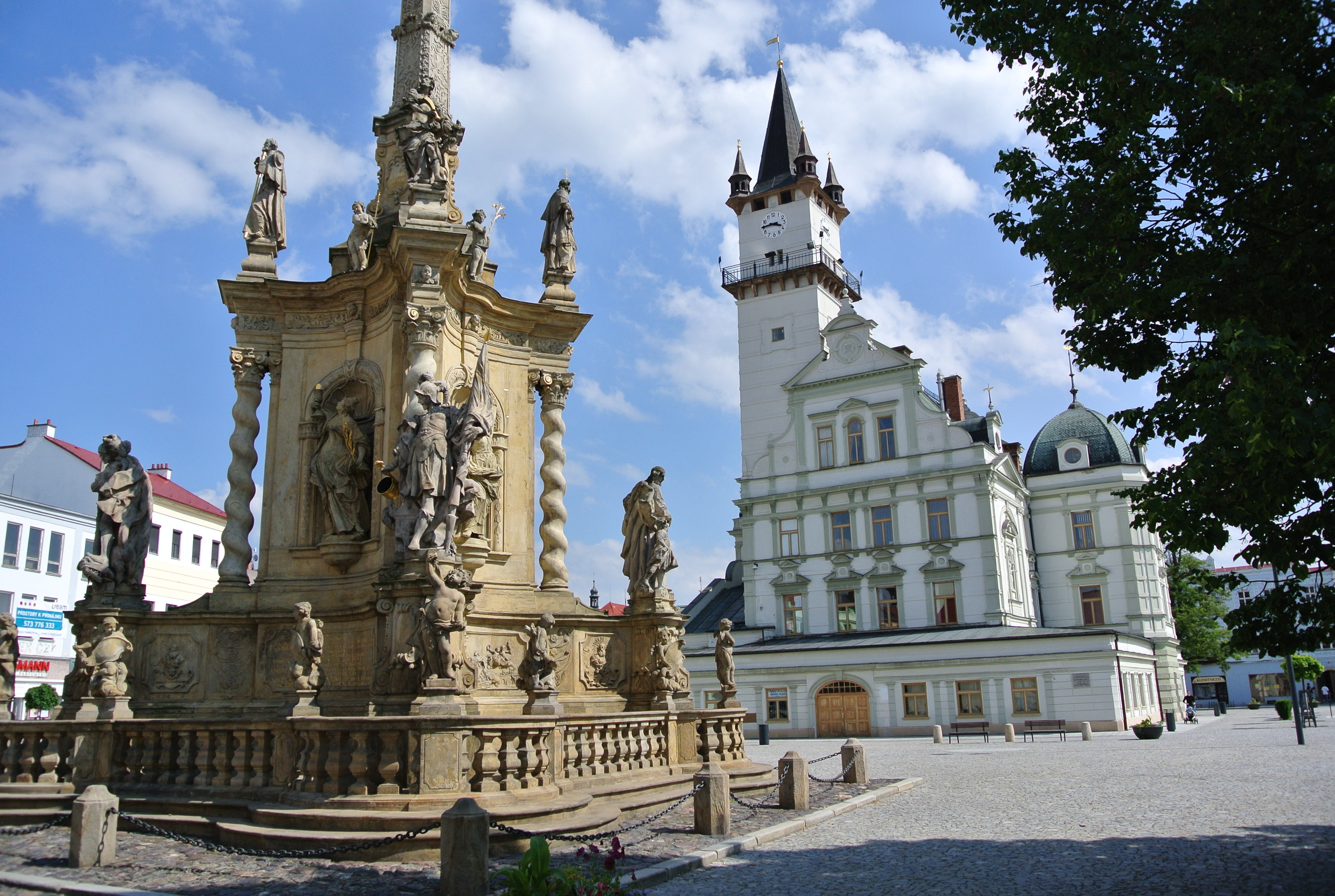 Sloup se sousoším - Mariánský sloup (Uničov), Masarykovo náměstí, Uničov